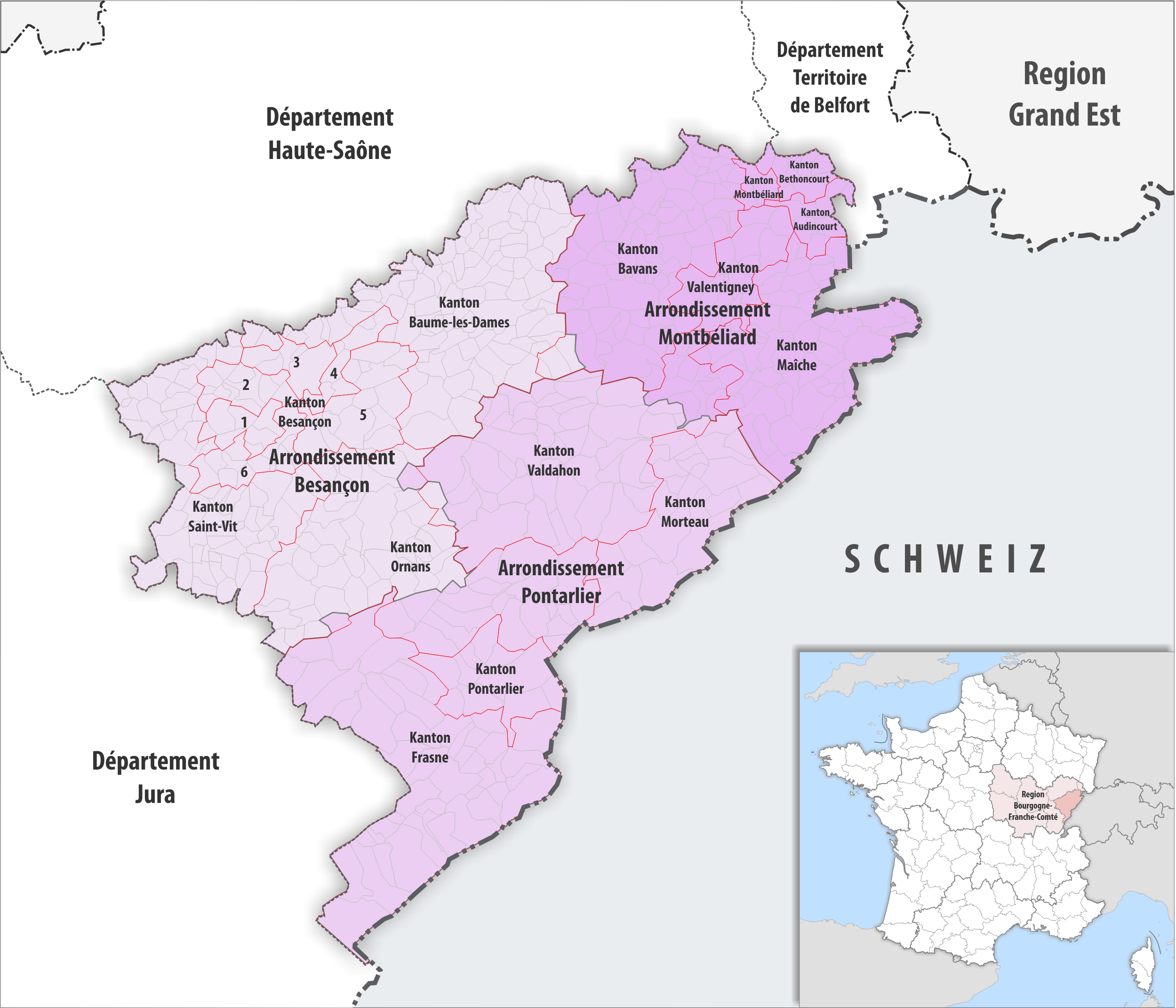 Gemeinden, Kantone und Arrondissemente im Departement Doubs